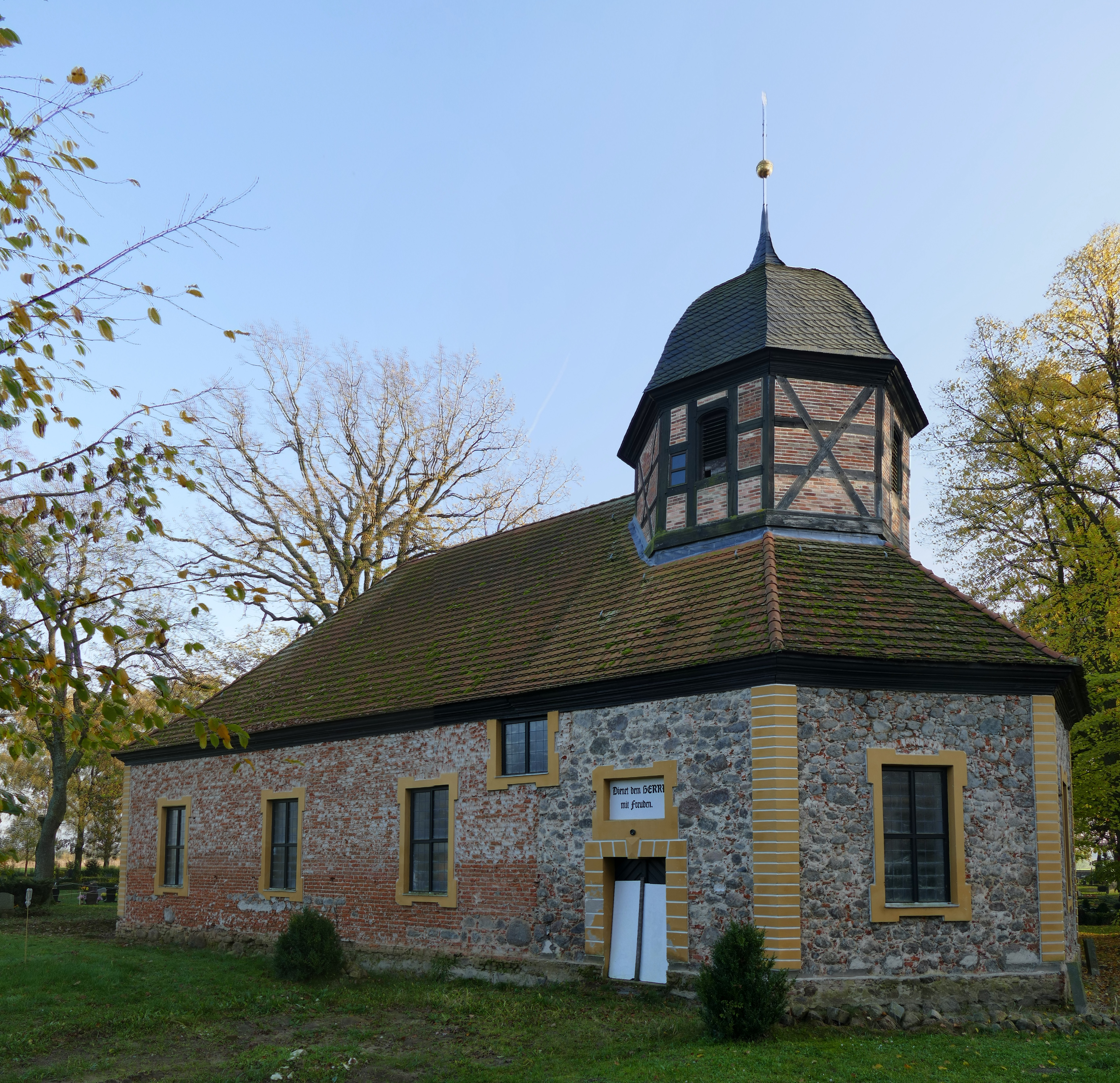 Dreifaltigkeitskirche auf dem Scharmützel bei Ferdinandshof, Ansicht von Nordwesten